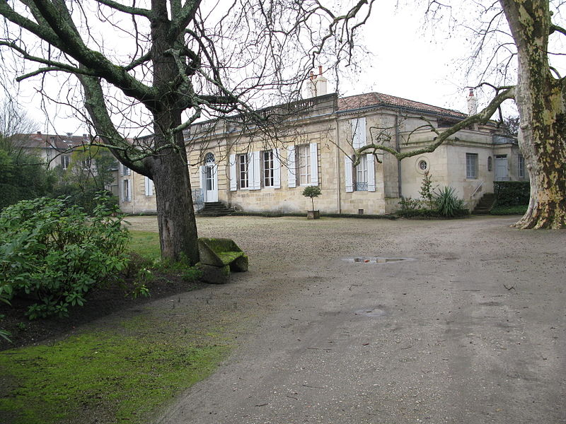 Chartreuse de Mirande, 20 Avenue de Mirande à Bordeaux, classé aux Monuments Historiques depuis le 10 octobre 1980.